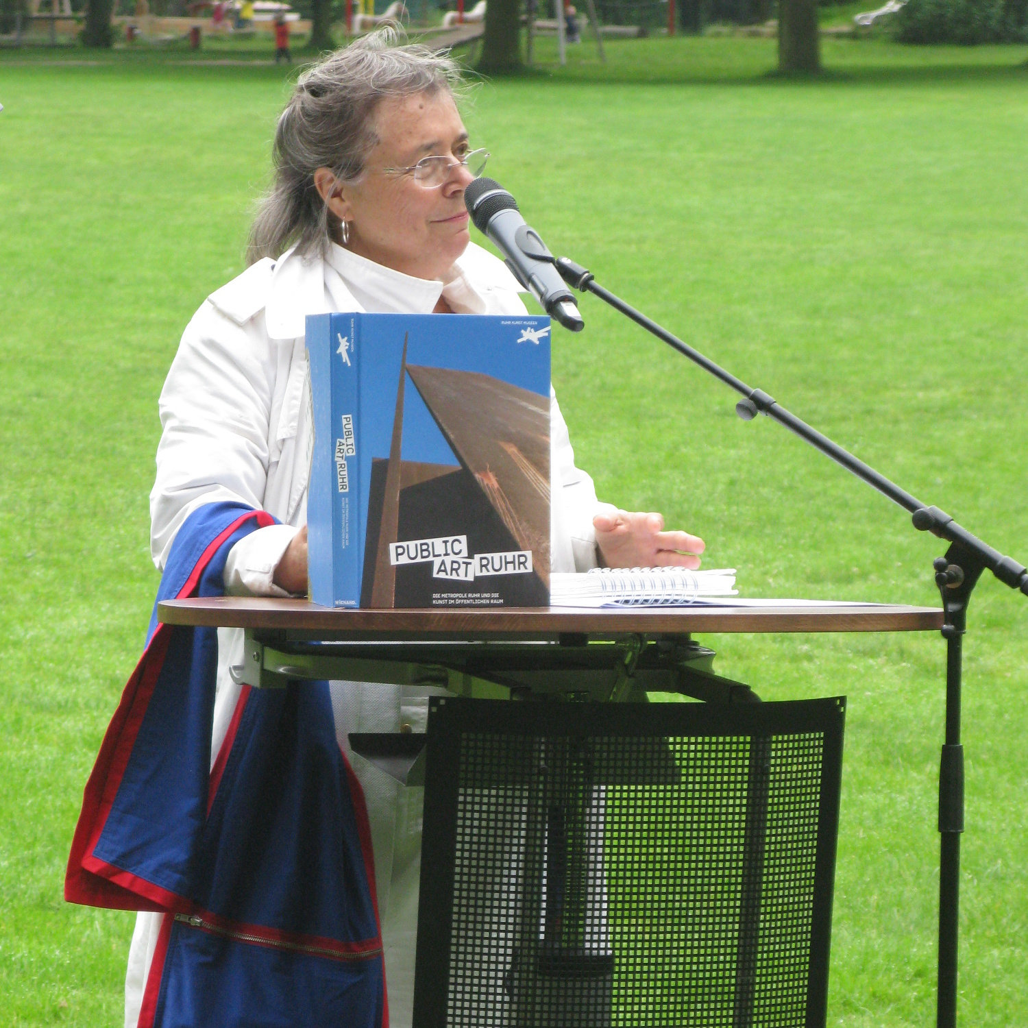 Maria Nordman am 21. Juni 2016 in Essen auf der Brehm-Insel